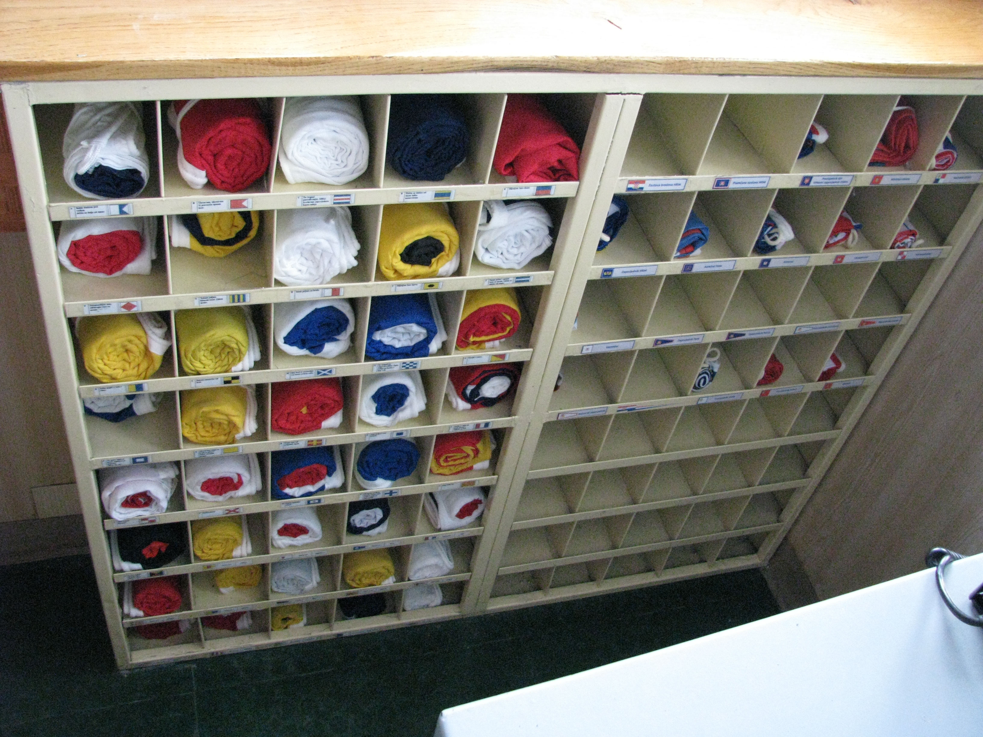 Komplet zastava na DBM-81 Cetina. Lijevo signalne zastave, desno zapovjedne zastave i plamenci.